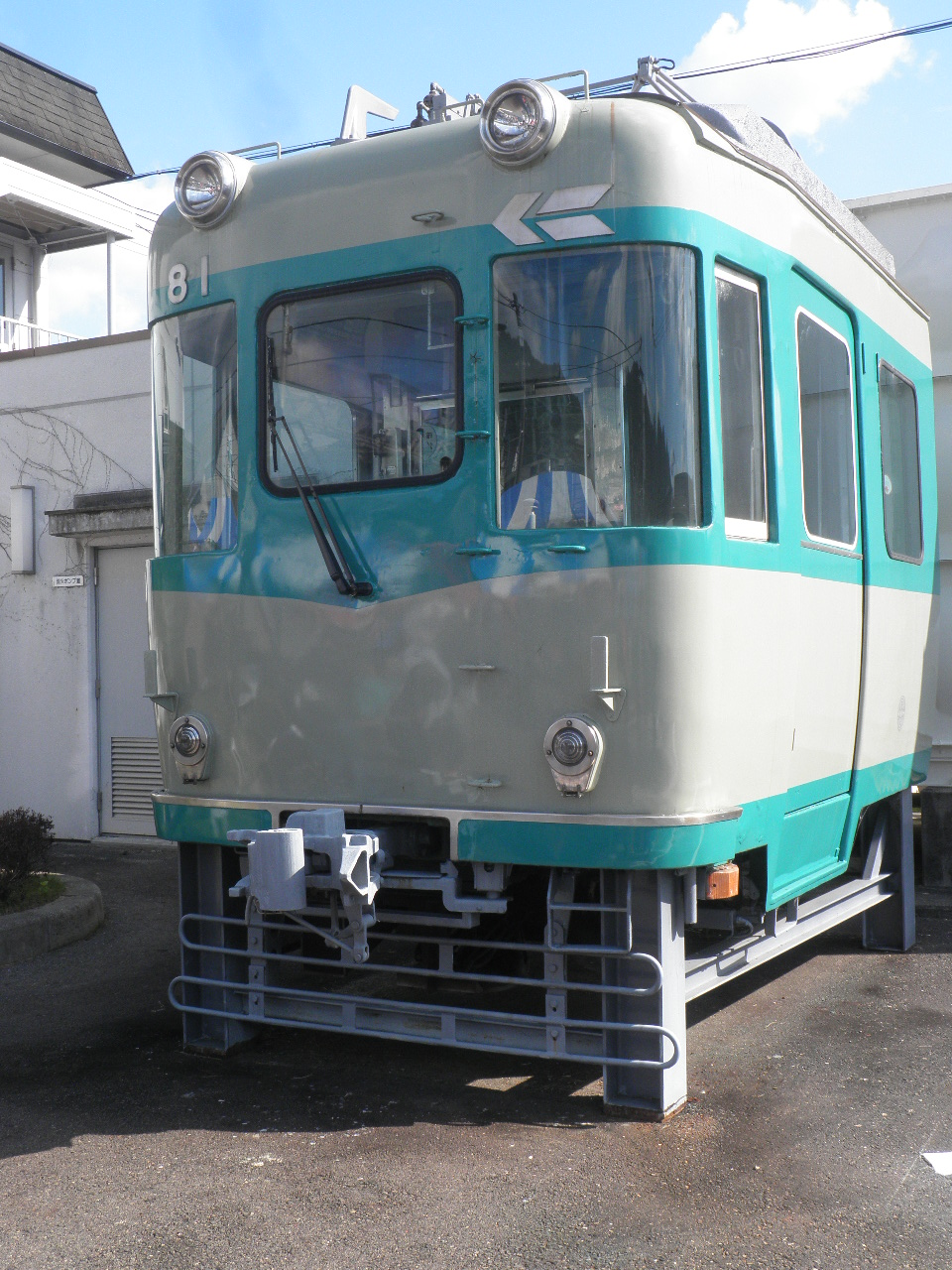 81号車は錦織車庫にカットボディで保存される